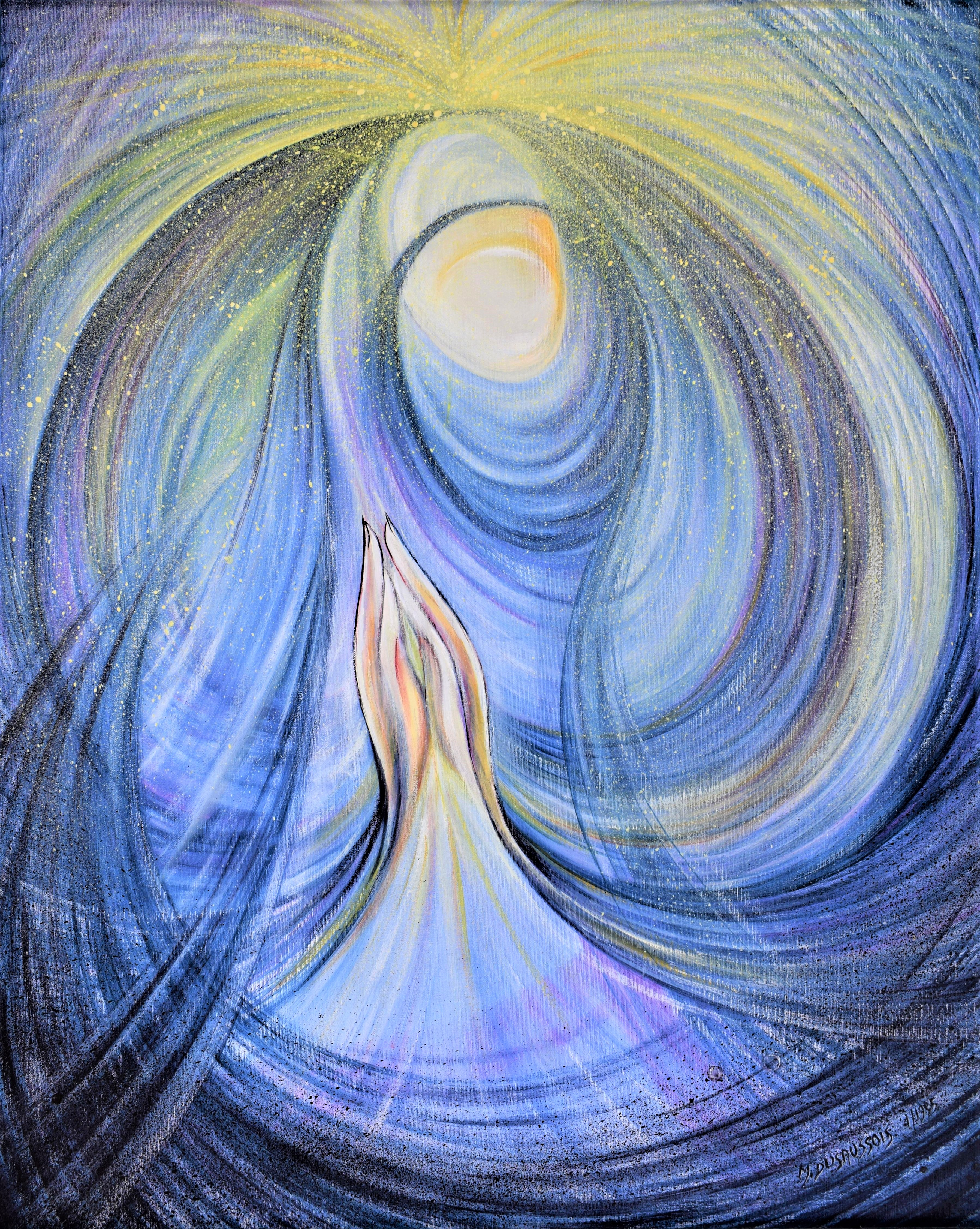 Ce tableau figure la vision mystique de l'univers de Marcel Dusaussois.